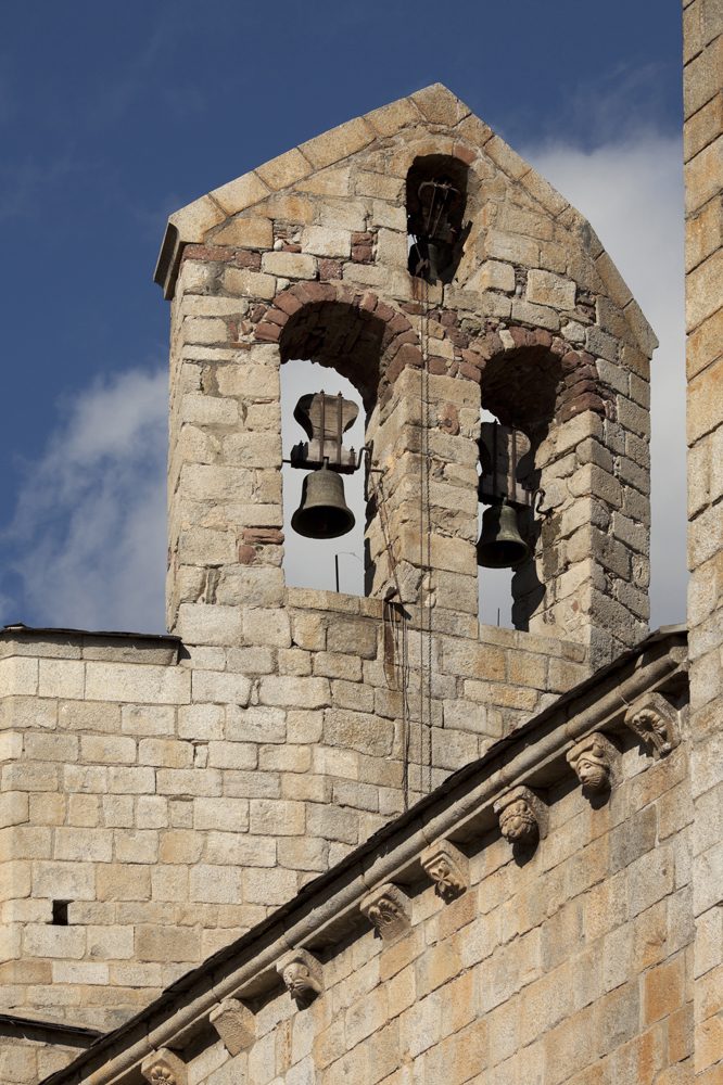 unidentified Spain